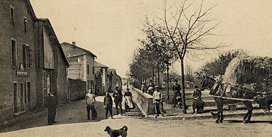 Saint-Priest (69) : carte postale ancienne montrant le centre du village entre 1900 et 1910